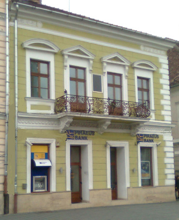 Bolyai János kolozsvári szülőháza